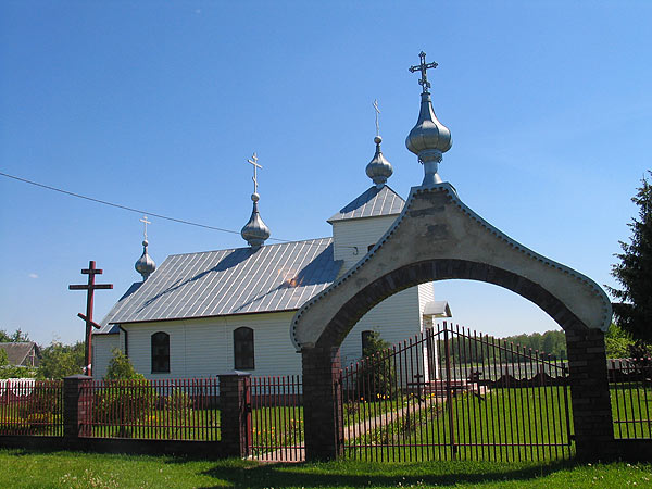 Cerkiew we wsi Kopytów.